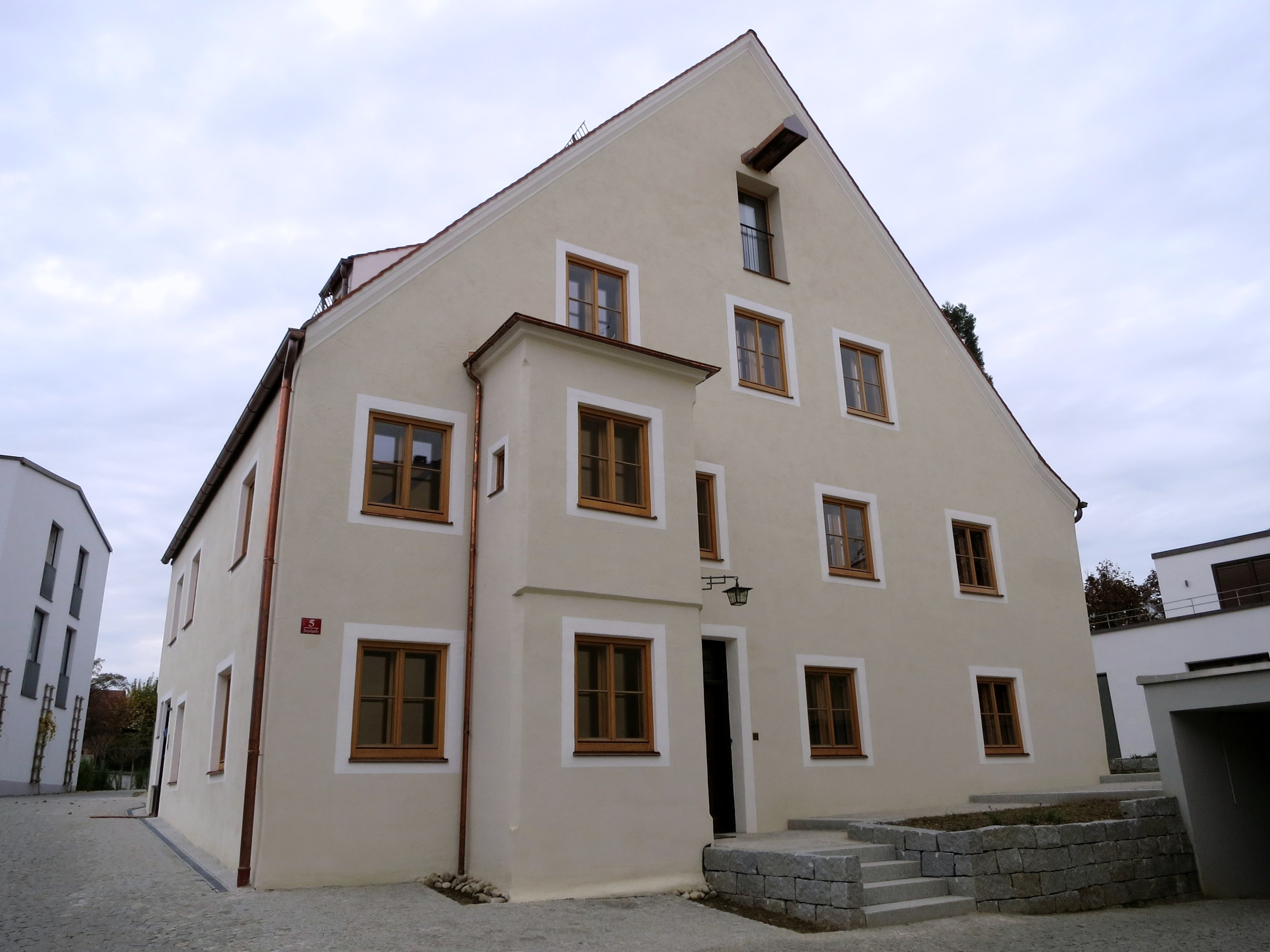 Östlicher Giebel mit Standerker und alter Haustür